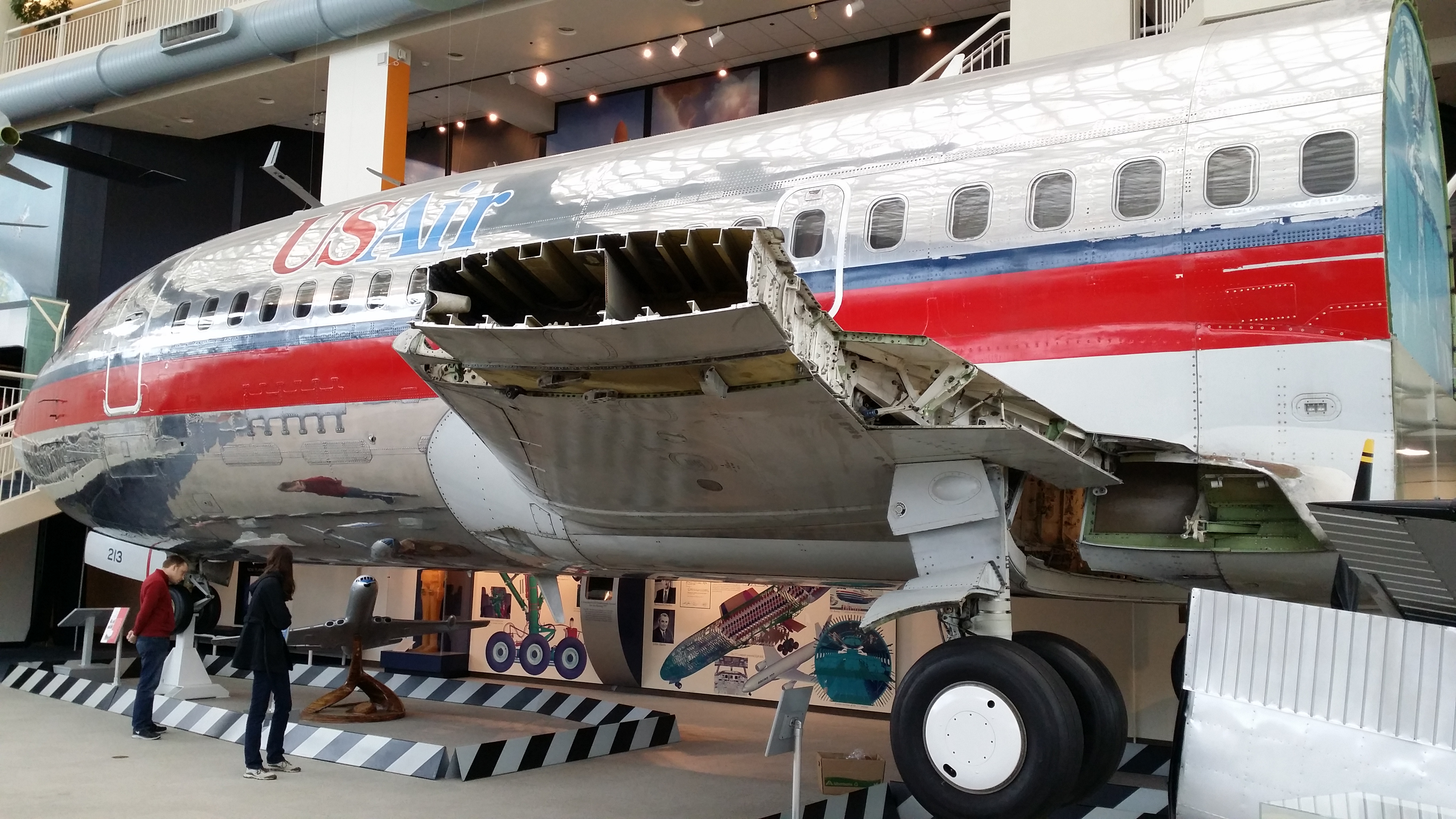 Tukwila, WA, USA